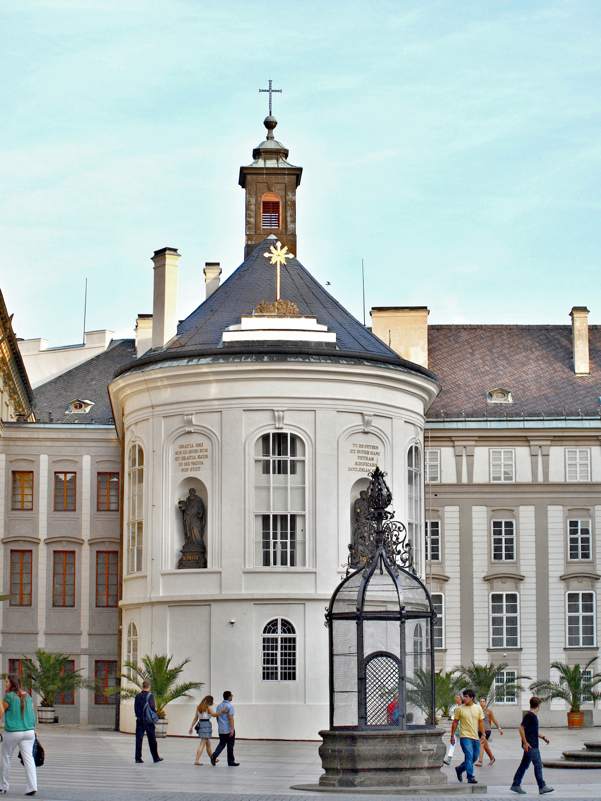 Kaple sv. Kříže, Pražský hrad